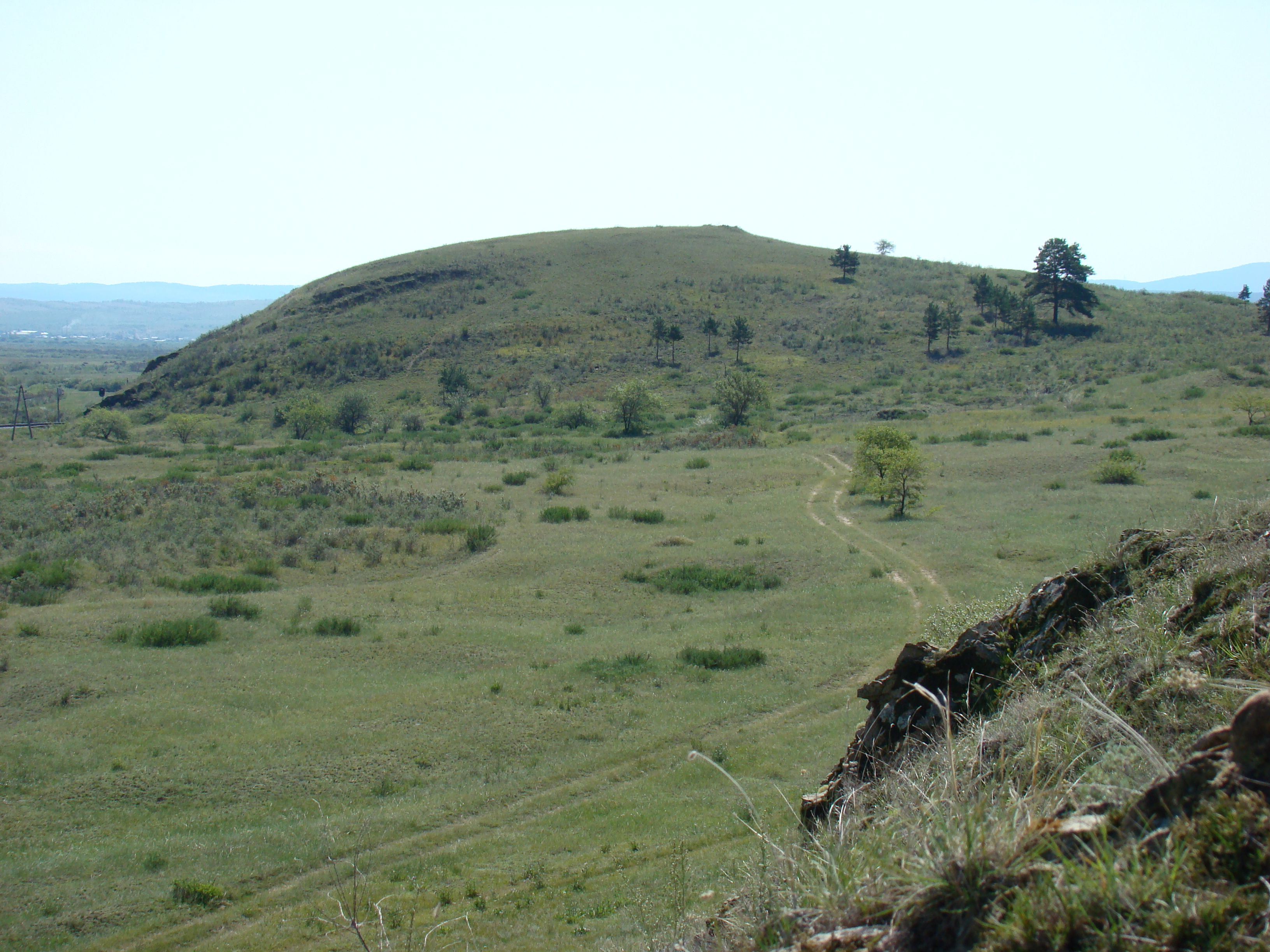 Гора Бага-Заря